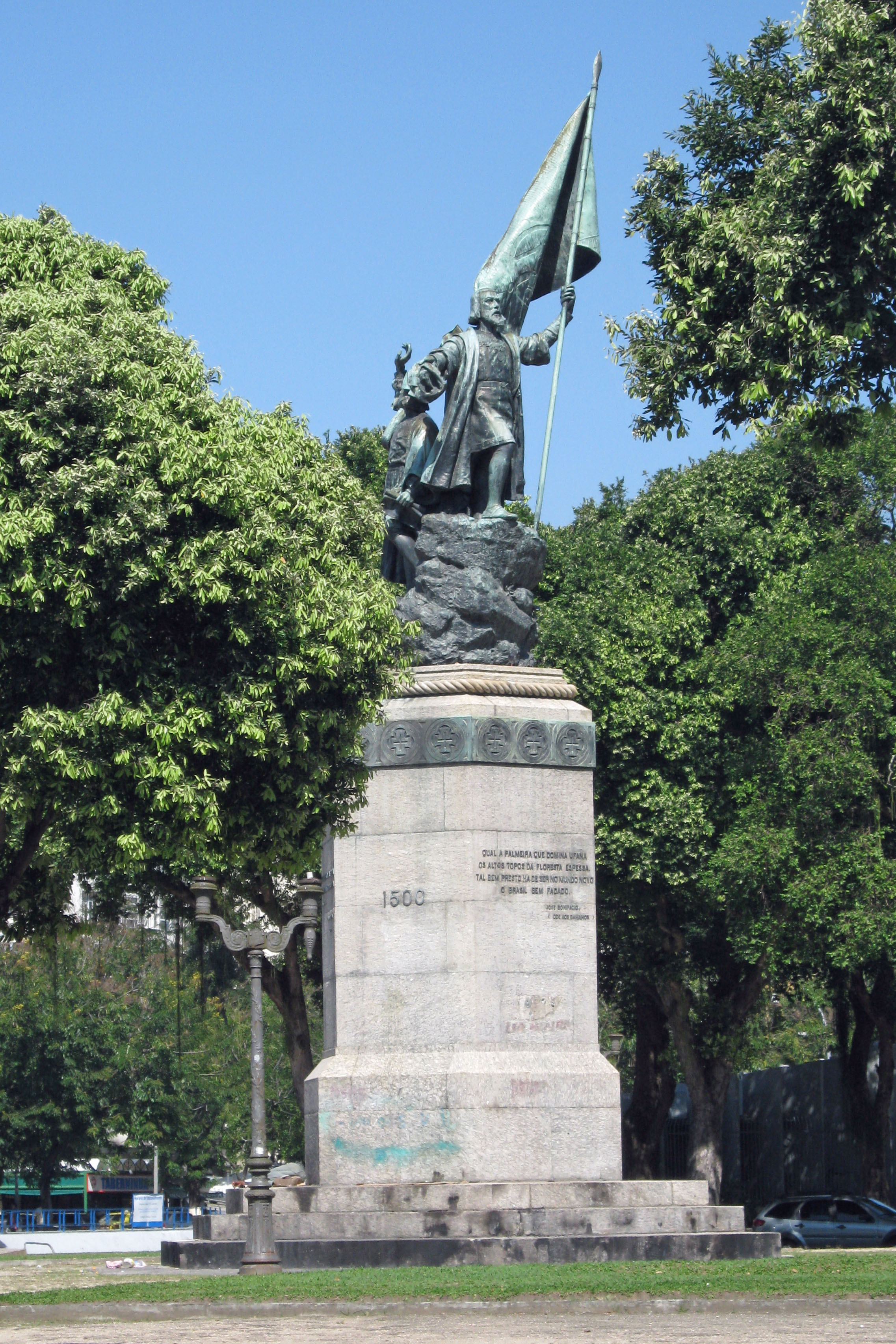 Monumento a Pedro Álvares Cabral